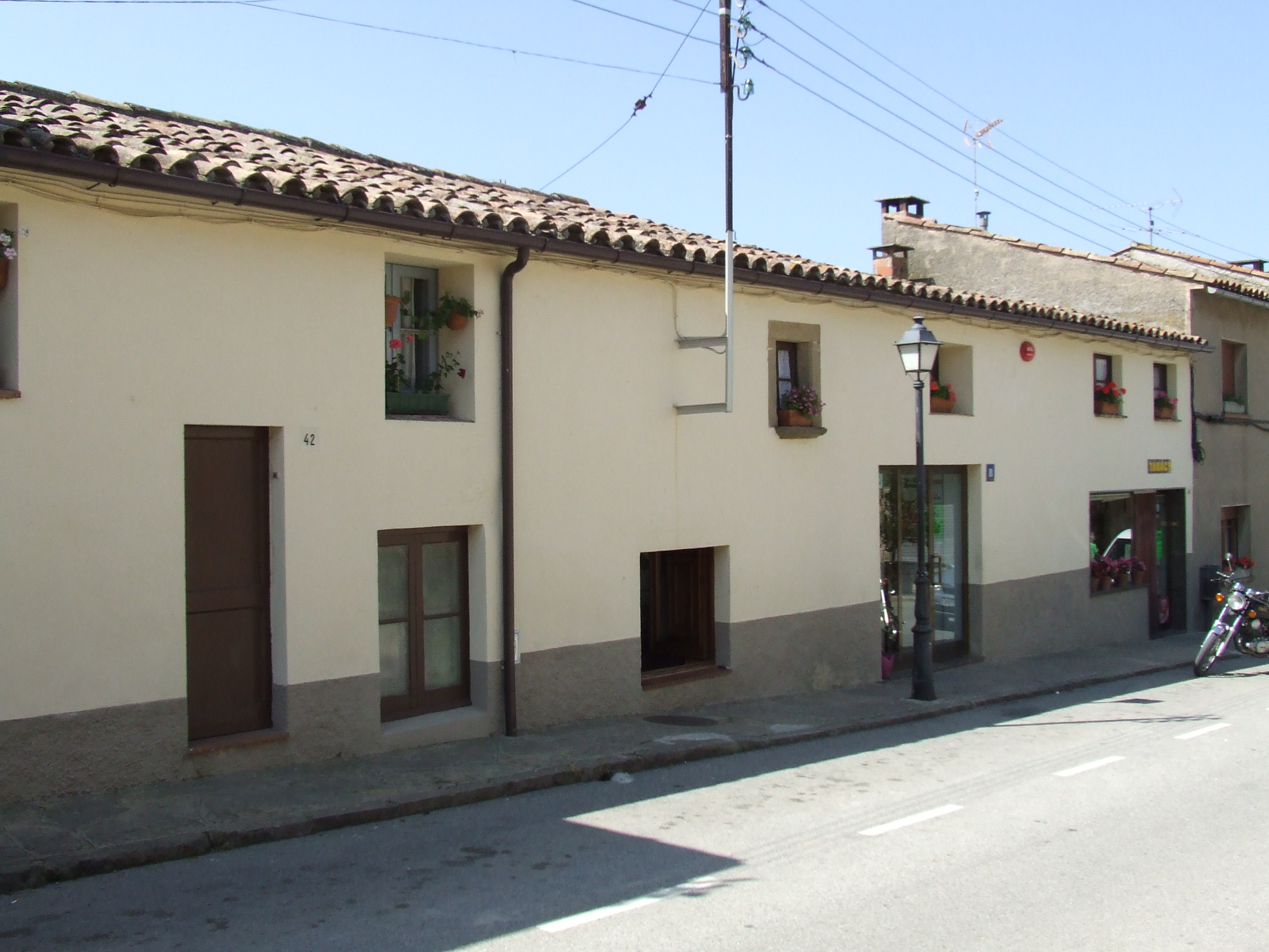 Cal Bartomeu i Cal Xapano (Castellcir, Moianès)